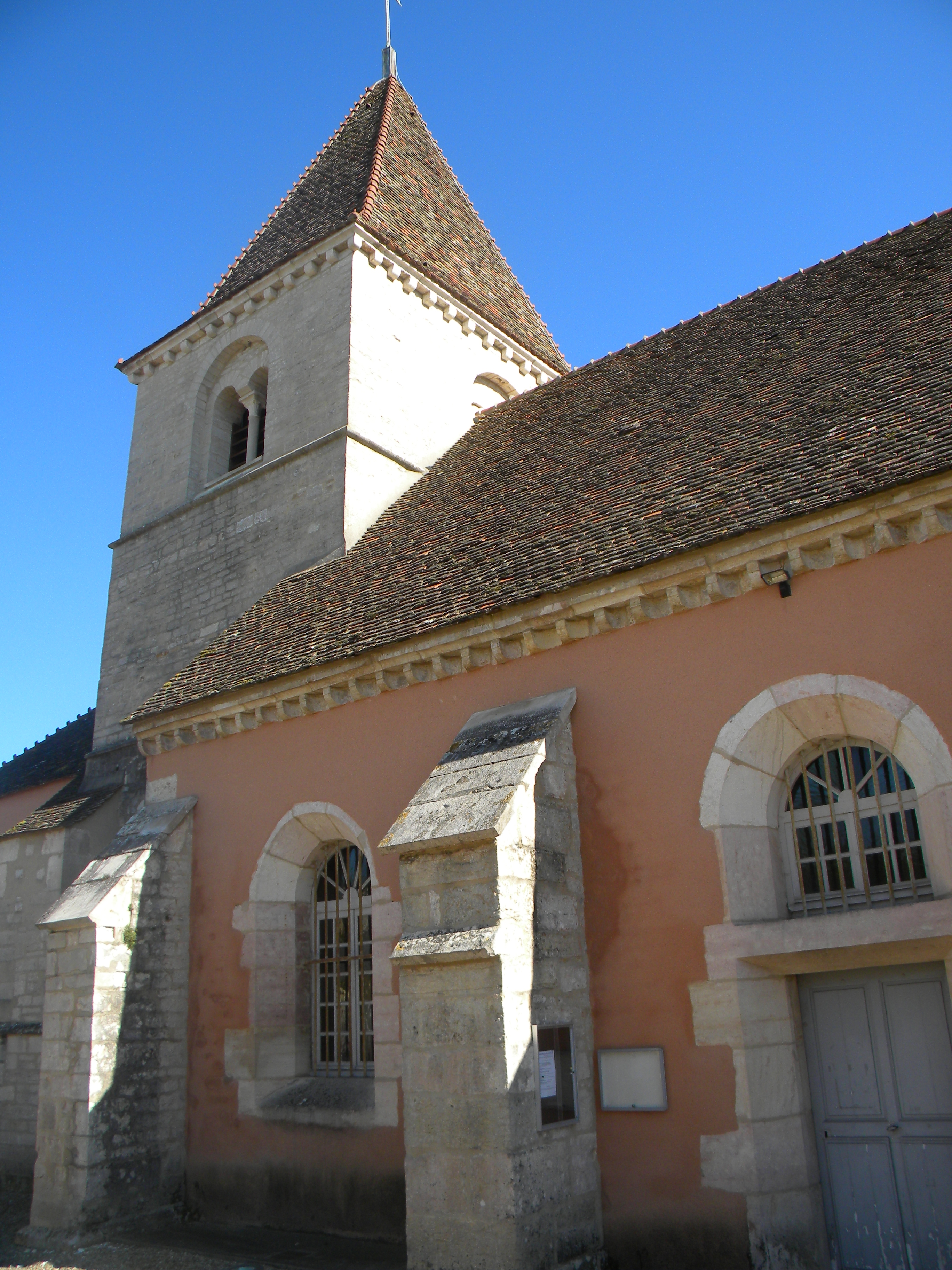 Église Notre-Dame-de-l'Assomption